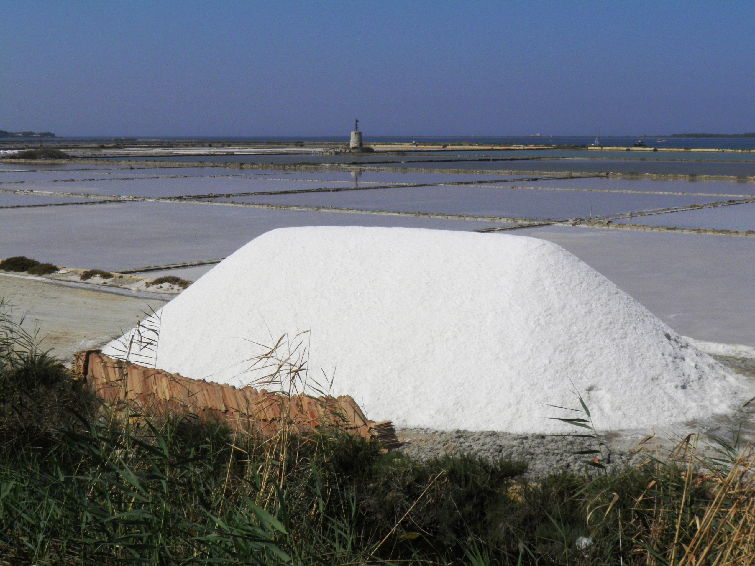 Il sale raccolto nelle saline di Trapani viene ammucchiato per essere poi caricato al confezionamento This is a photo of a monument which is part of cultural heritage of Italy. The authorisation for taking photos of this object was provided by the World Wide Fund for Nature Italy.